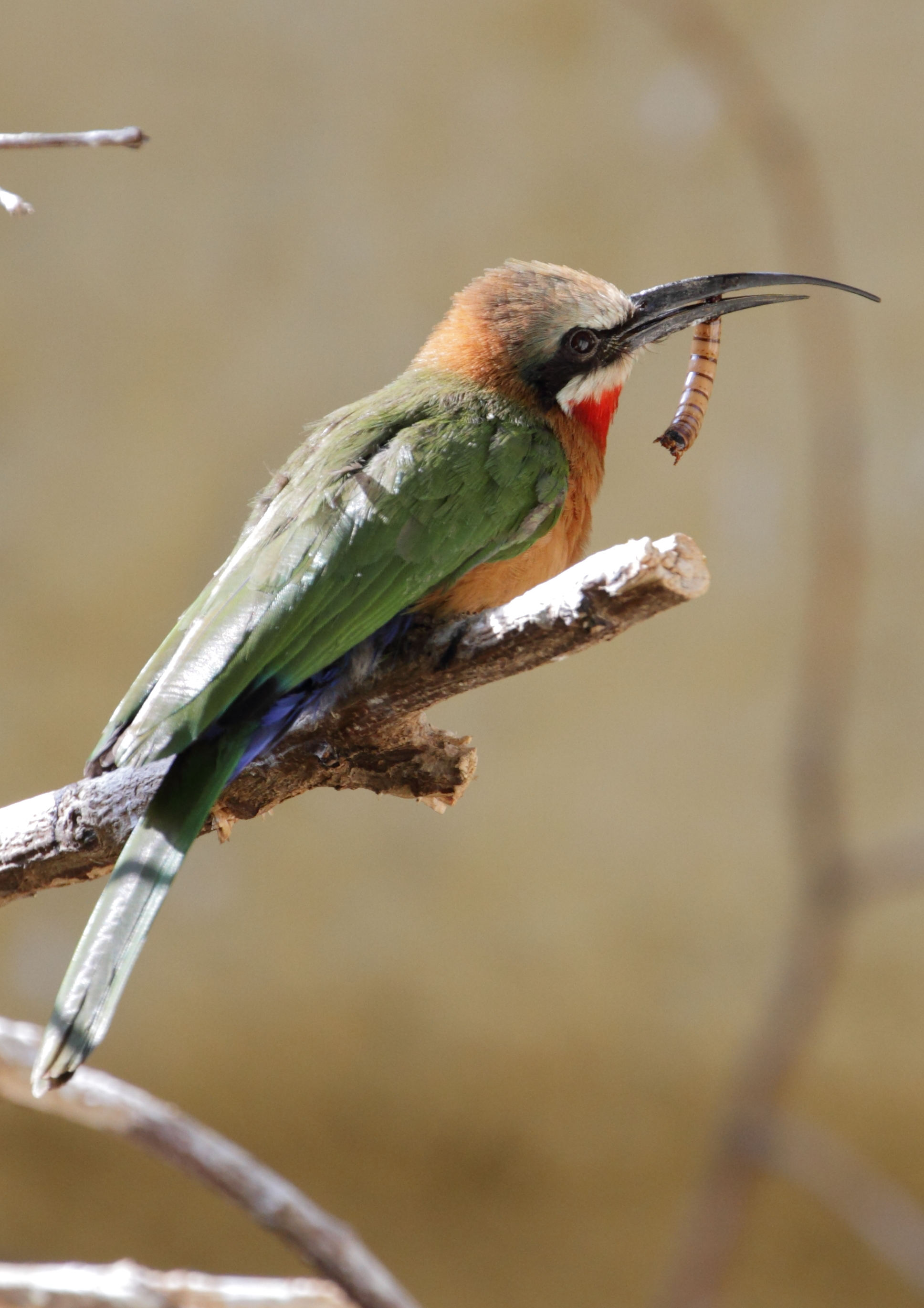 Weißstirnspint mit Beute im Tiergarten Schönbrunn.